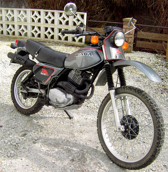 honda xl 500 sb